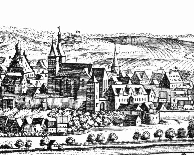 Plauen, St. Johanniskirche: Ausschnitt aus dem Merian-Stich